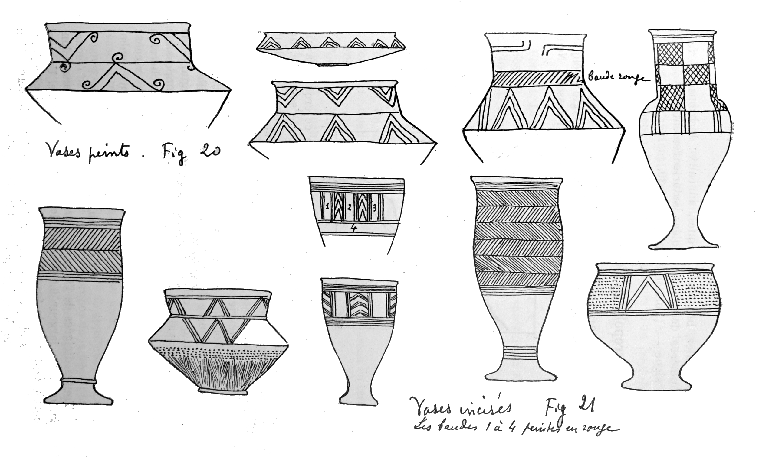 tiré du "Bulletin de la Société archéologique champenoise".